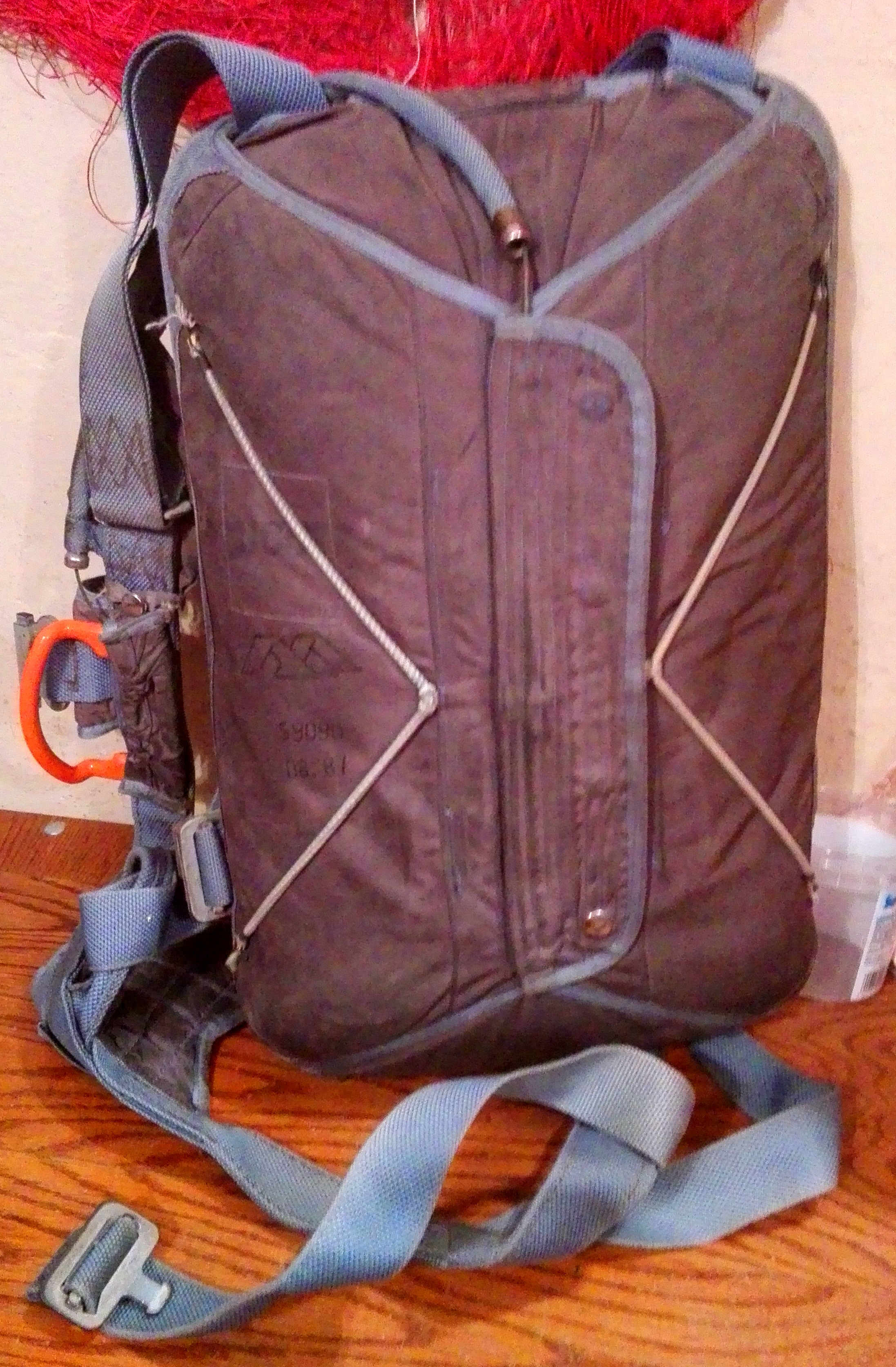 Spadochron ratowniczy SP-6 — Sekcja samolotowa Aeroklubu Gliwickiego